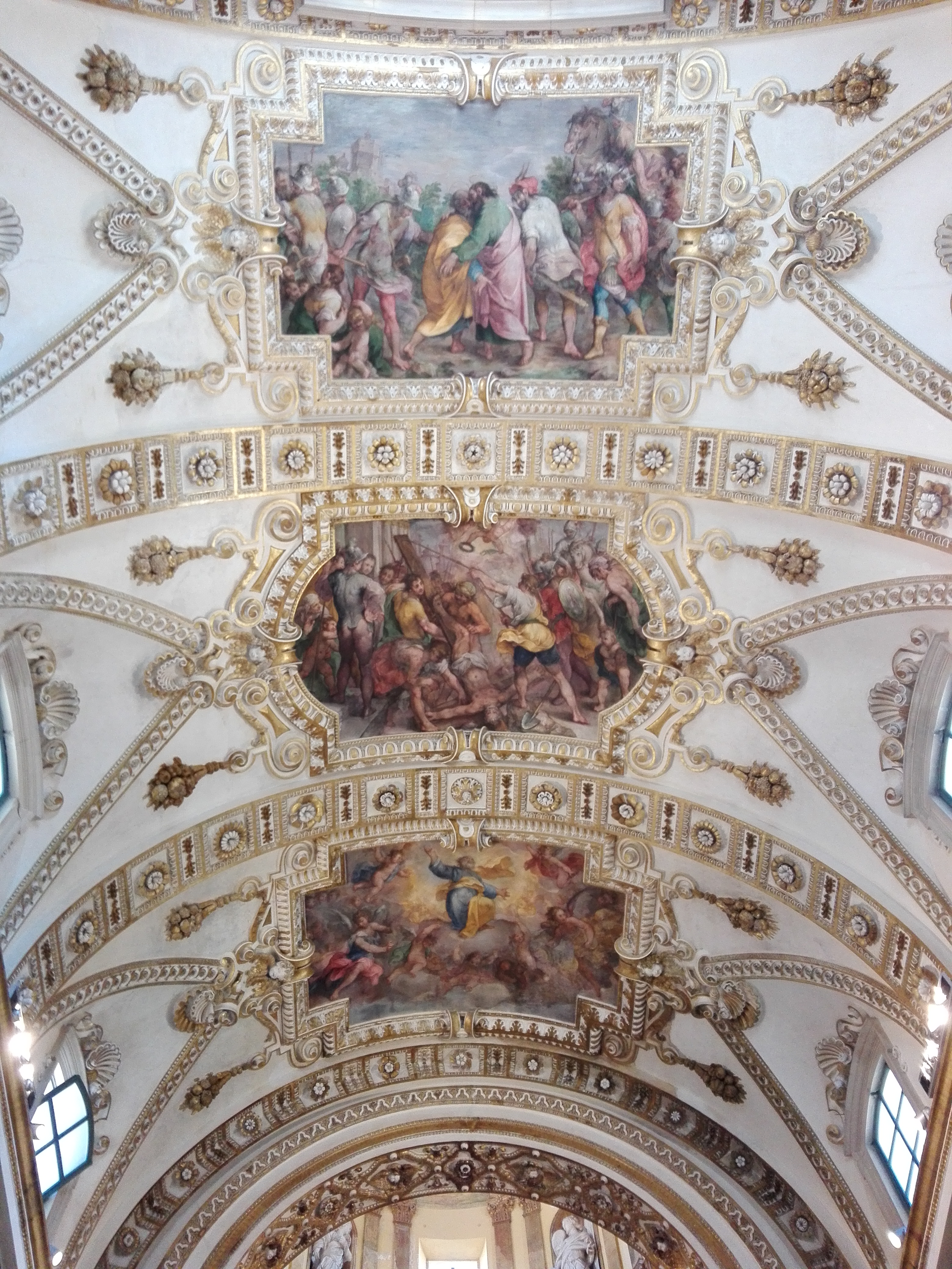 Chiesa